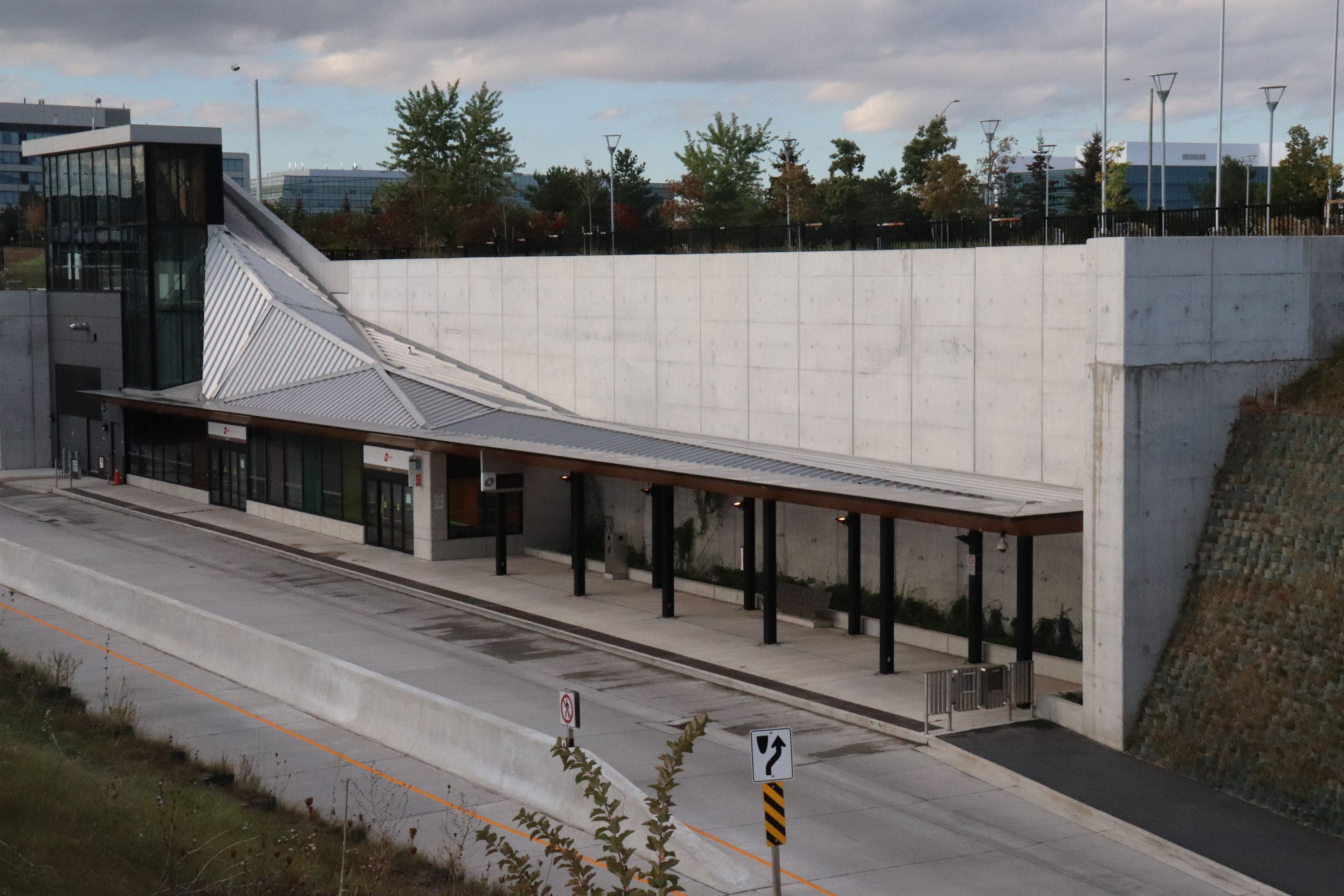 Станція Tahoe швидкісного автобуса MiWay в Місісазі (Онтаріо).